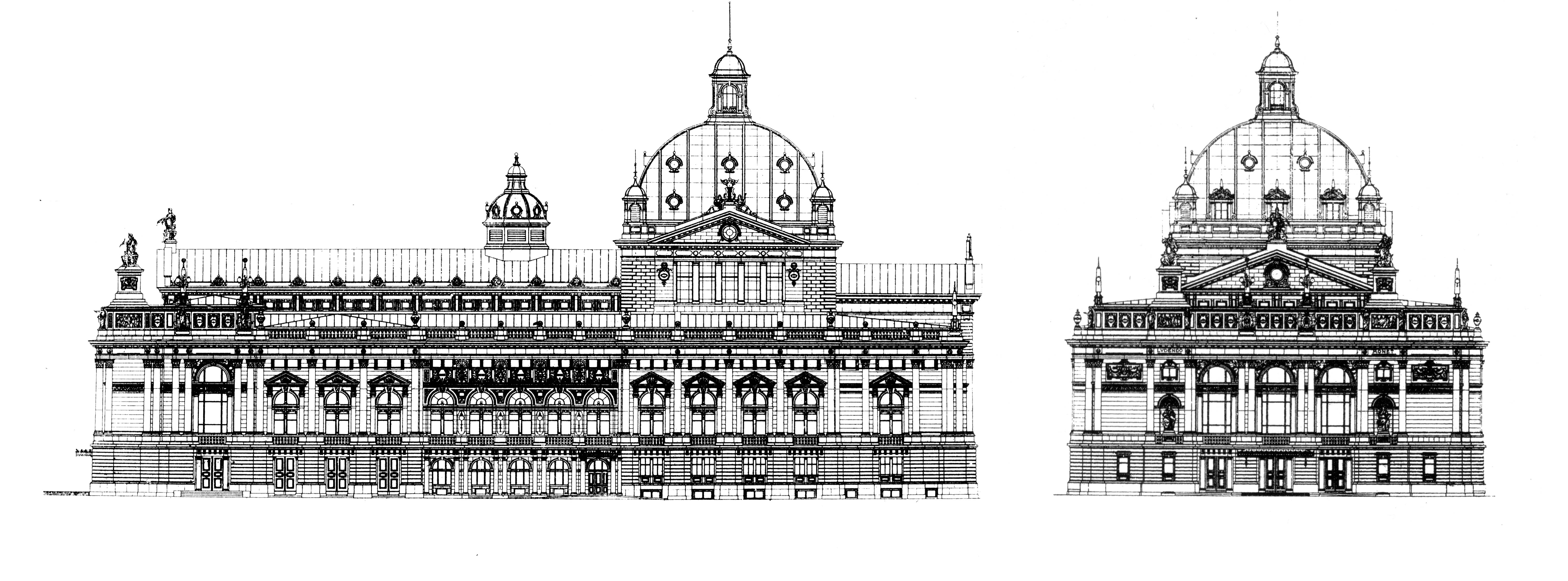 Проект Міського театру у Львові. Архітектор Зиґмунт Ґорґолевський.